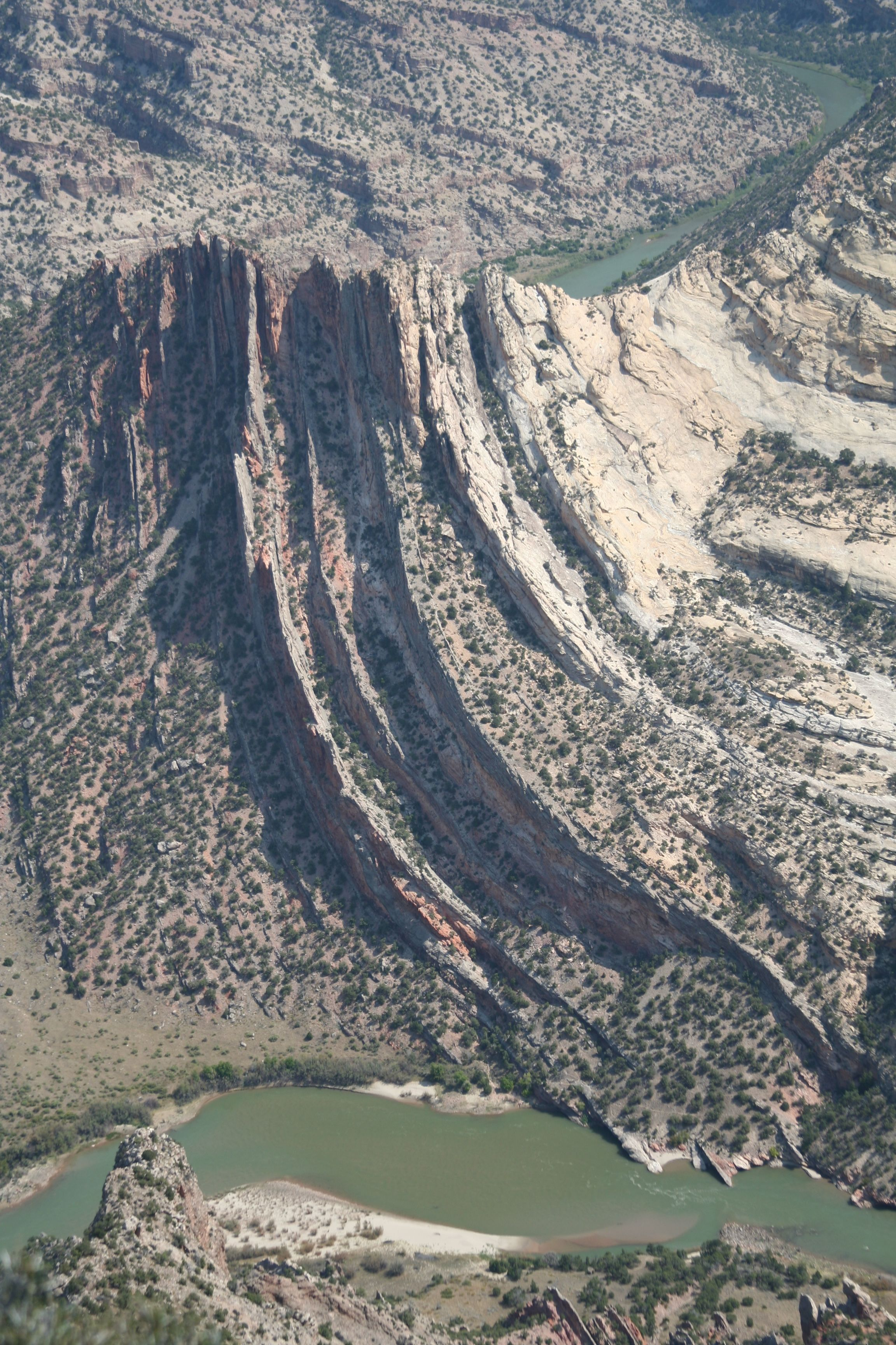 Mitten Park Fault and monocline